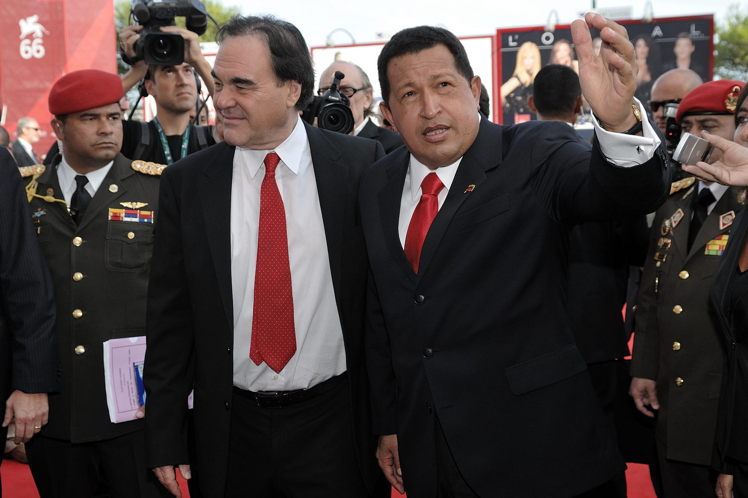 66ème Festival du Cinéma de Venise (Mostra), 6ème jour (07/09/2009) Hugo Chavez Le président du Venezuela a volé la vedette aux stars de cinéma après la projection de South of the border, un documentaire au ton hagiographique où l'Américain Oliver Stone défend sa révolution pacifiste